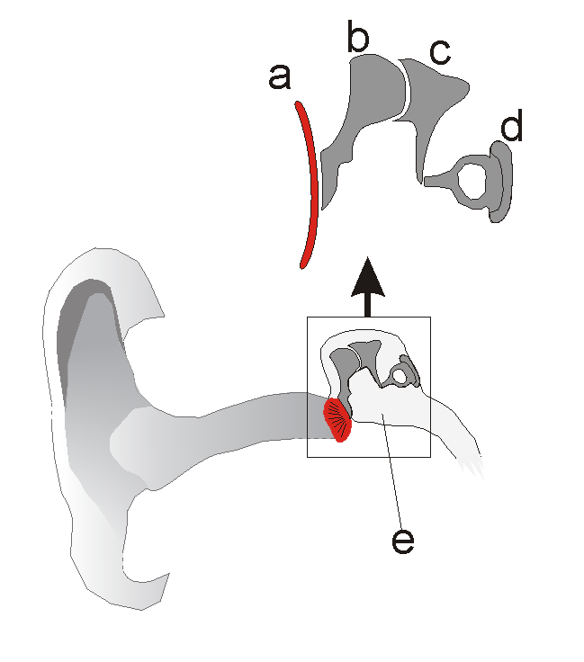 Schéma převodního systému ucha - bubínek znázorněn červeně: a – bubínek, b – kladívko, c – kovadlinka, d – třmínek, e – středoušní dutina